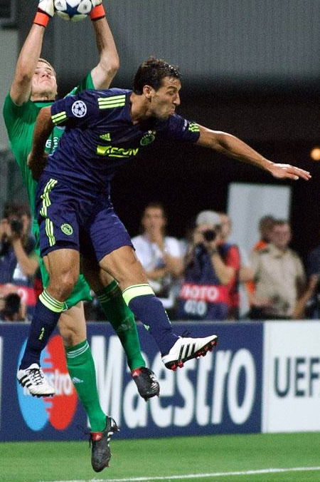 Mounir El Hamdaoui